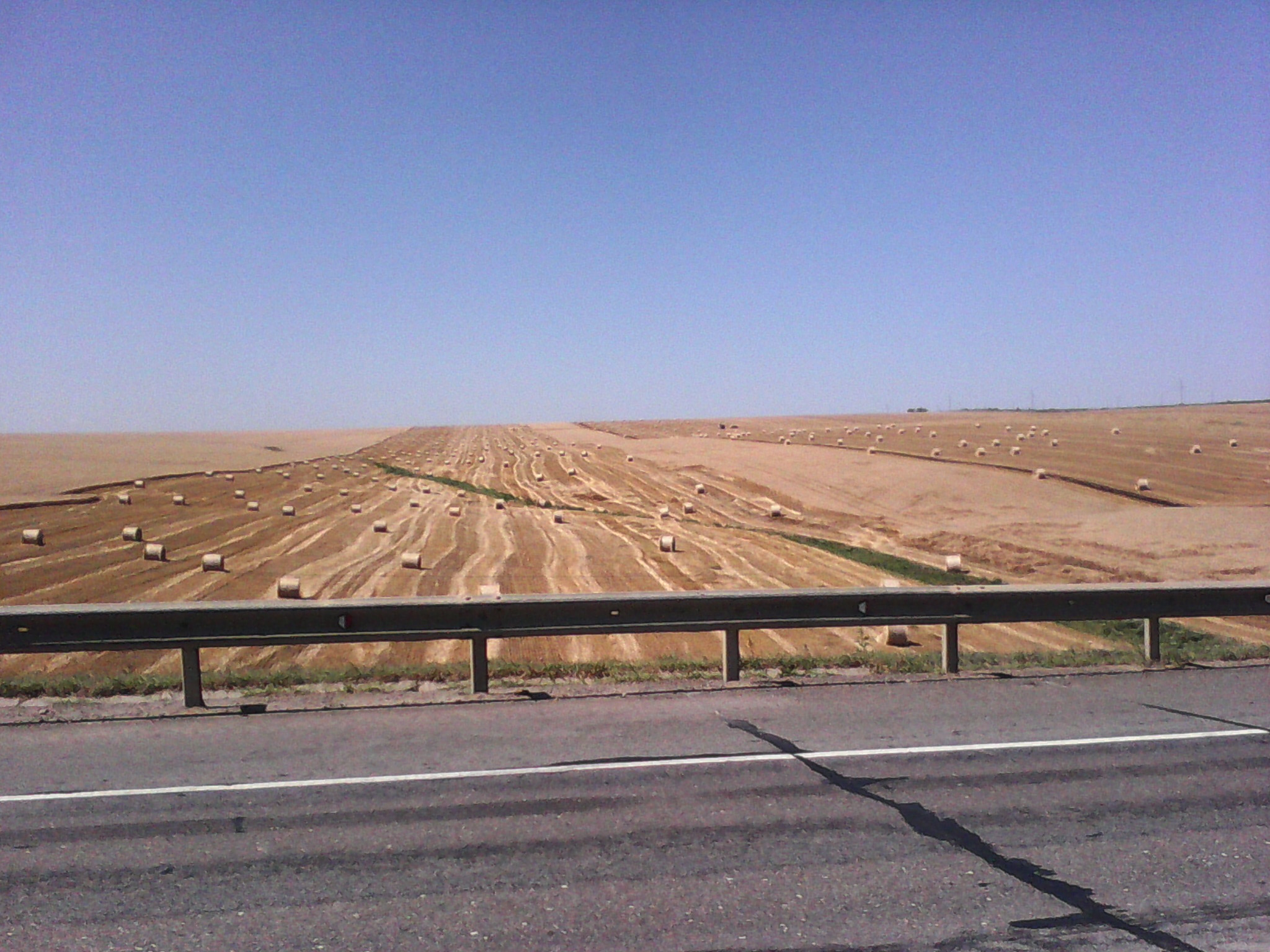 Уборочная страда